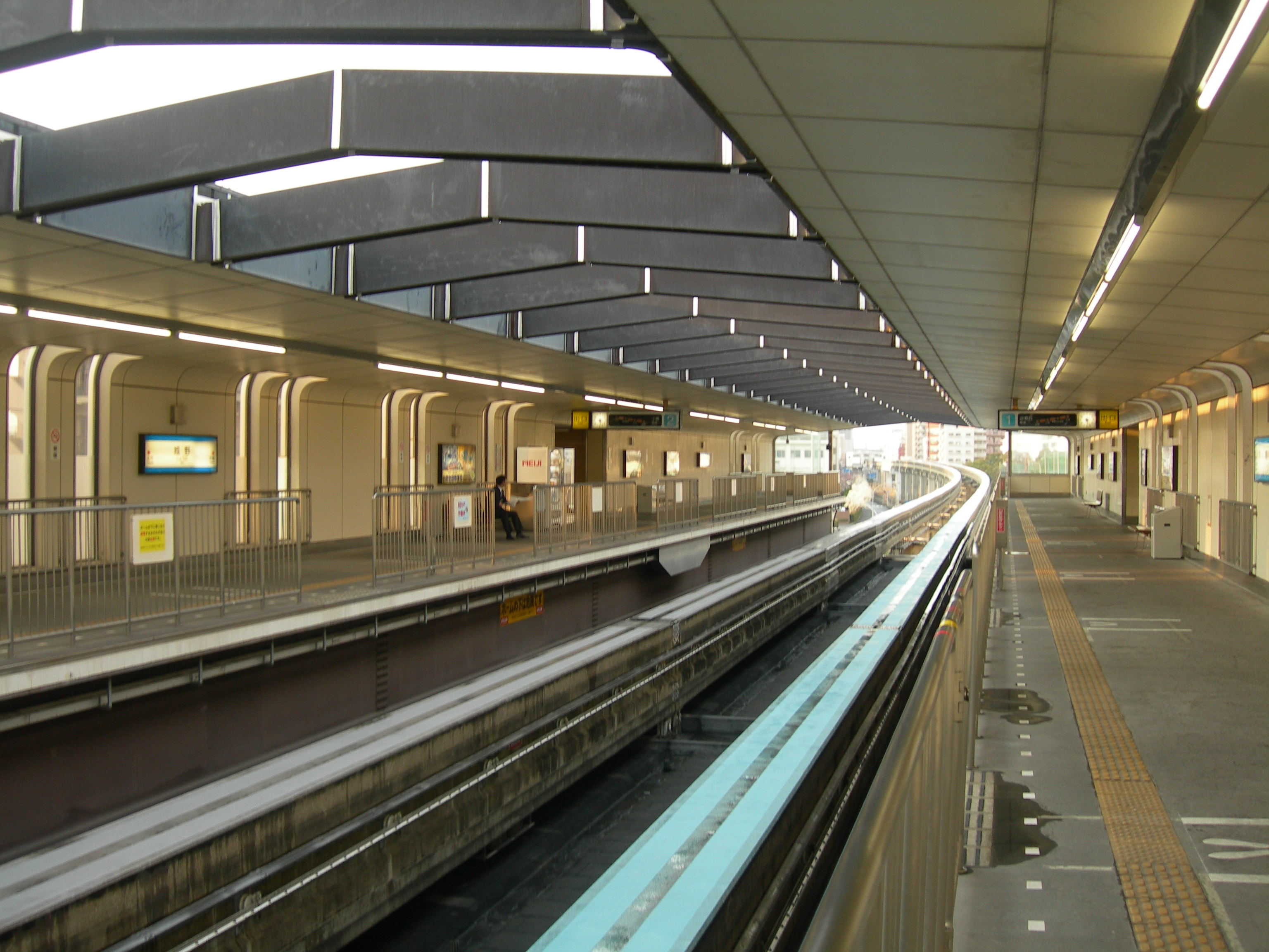 城野駅プラットホーム(北九州高速鉄道)